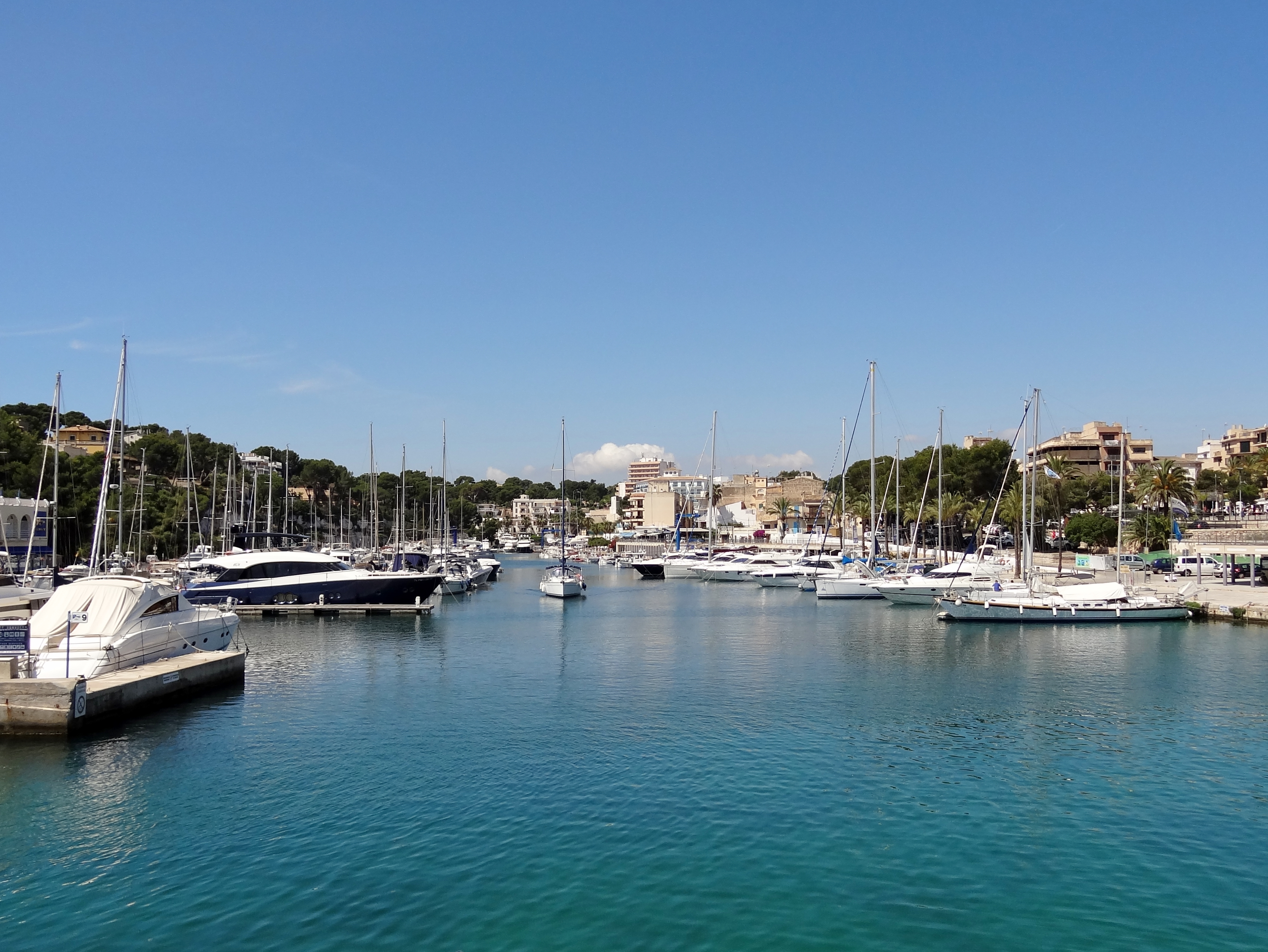 Hafen von Porto Cristo in der Gemeinde Manacor, Mallorca, Spanien